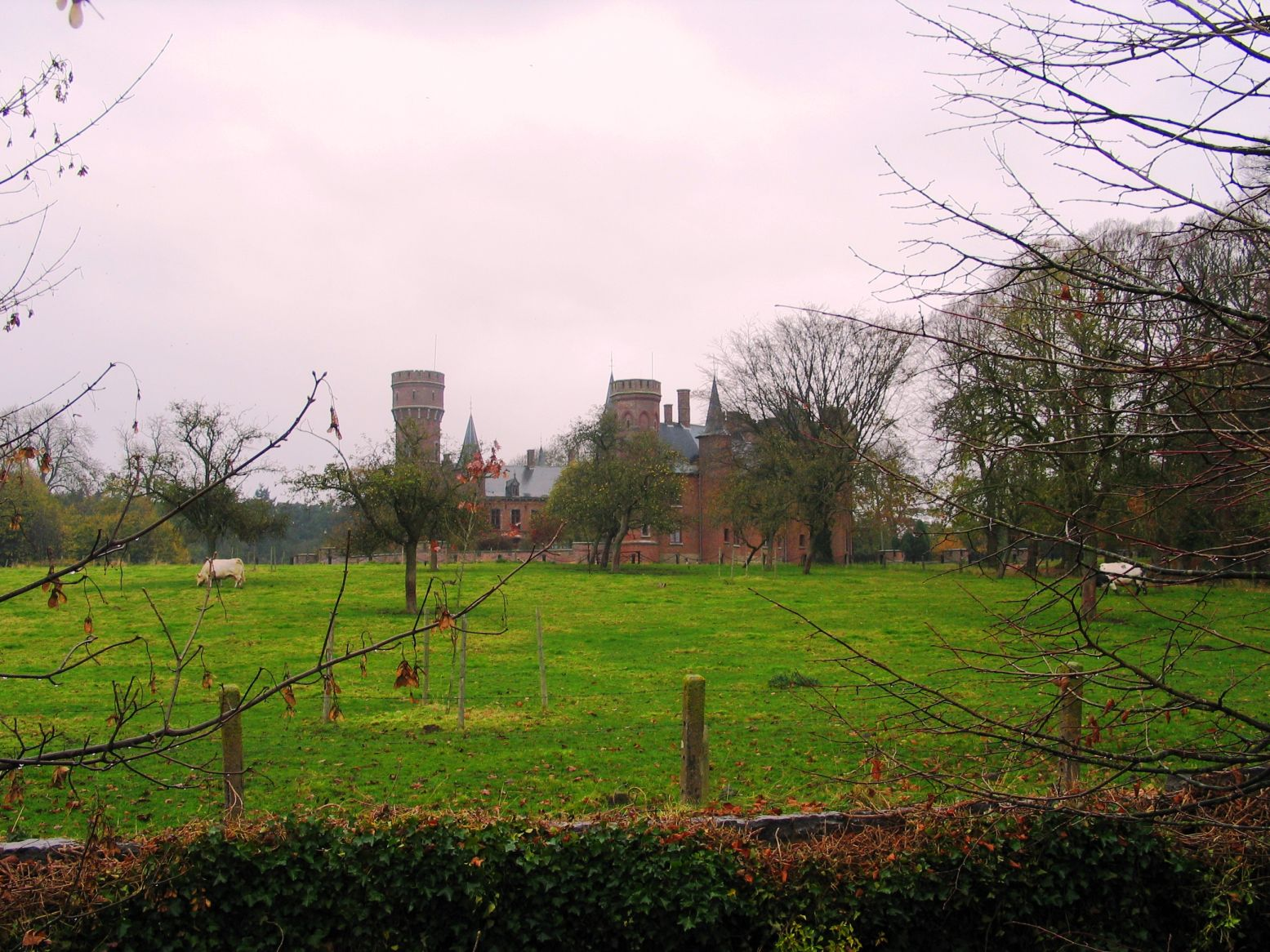 Kasteel van wijnendale - eigen foto